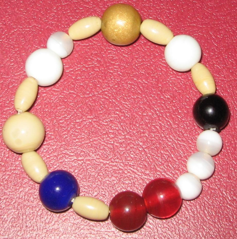 Жемчужины жизни.